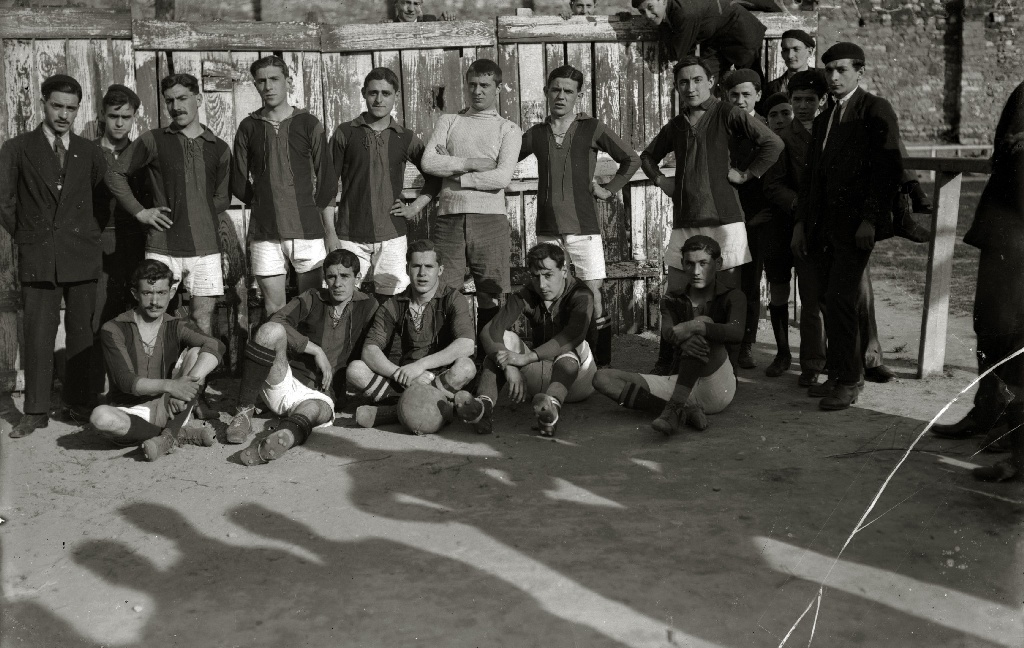 Título original: Los equipos de segunda categoría, Arzón y Esperanza (1/2) Localización: San Sebastián (Guipúzcoa)